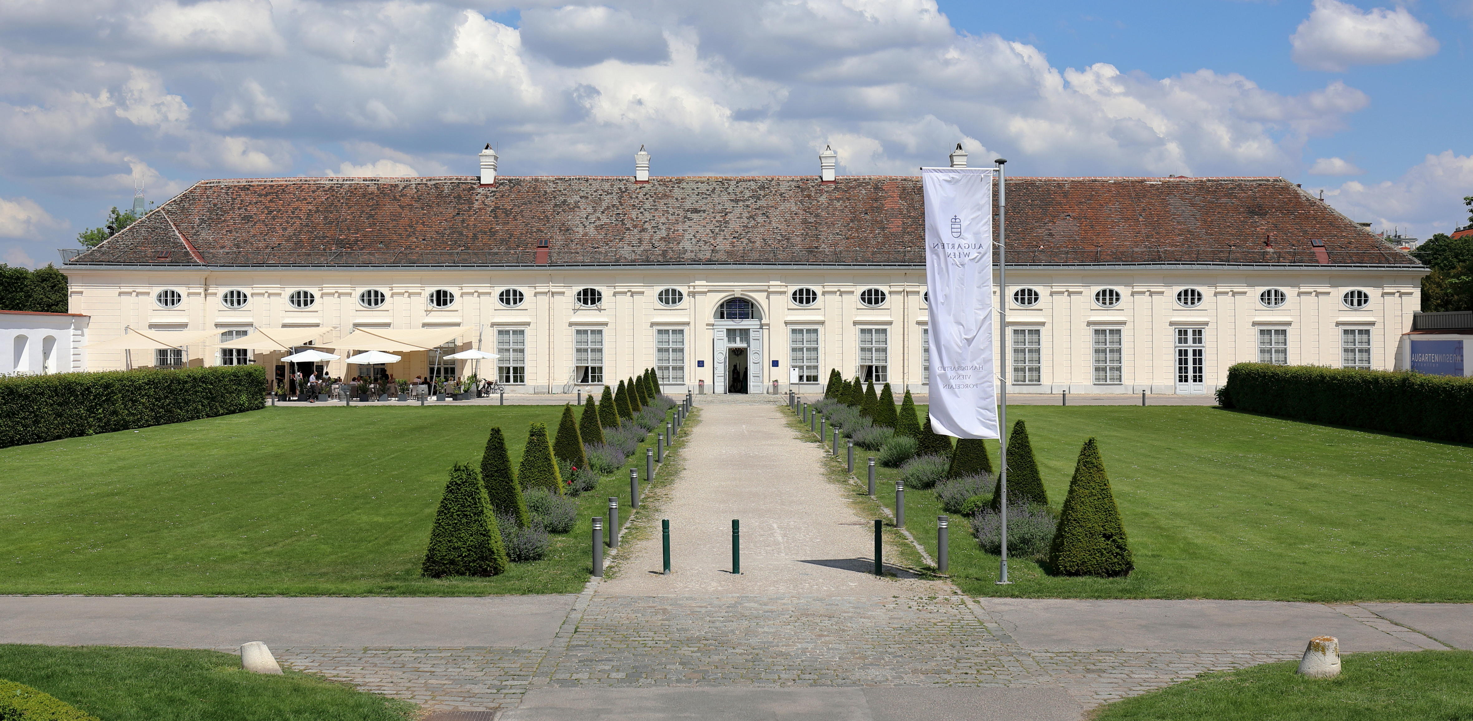 Das Schloss Augarten bzw. die Porzellanmanufaktur Augarten im 2. Wiener Gemeindebezirk Leopoldstadt. Das ursprüngliche Schloss wurde im Zuge der 2. Wiener Türkenbelagerung 1683 zerstört. Kaiser Joseph I. ließ 1705 auf den Resten des nordöstlichen Seitenflügels einen länglichen Saalbau errichten. Seit 1923 ist die Wiener Porzellanmanufaktur darin untergebracht, die darin aktuell (2018) ein Museum betreibt.